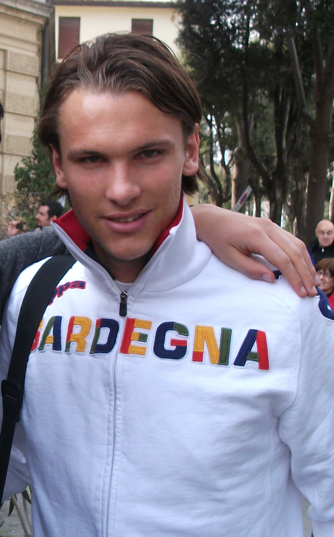 Albin Ekdal prima della partita di Serie A, Siena - Cagliari del 4 marzo 2012.